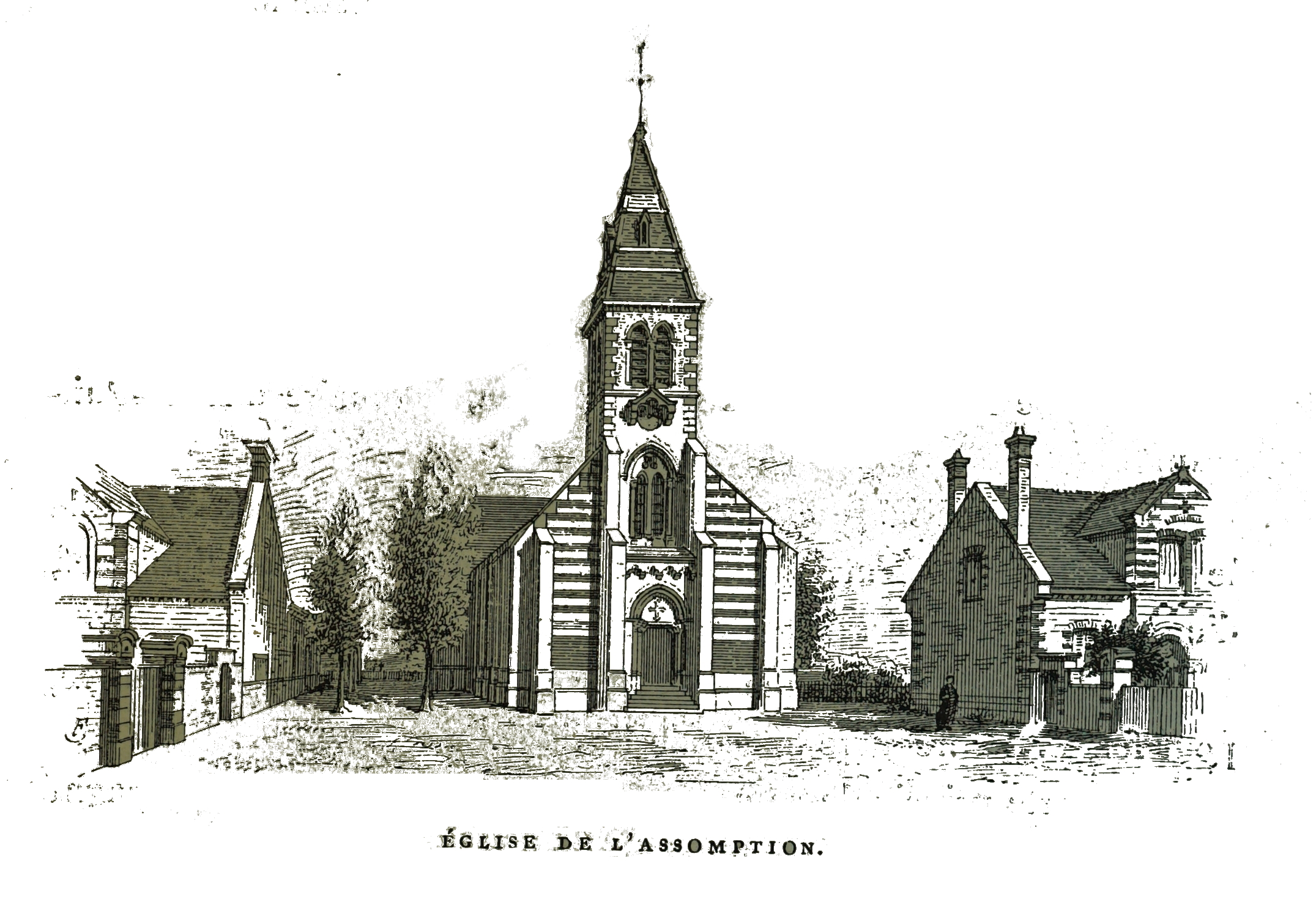 par un dessin de Fichot.